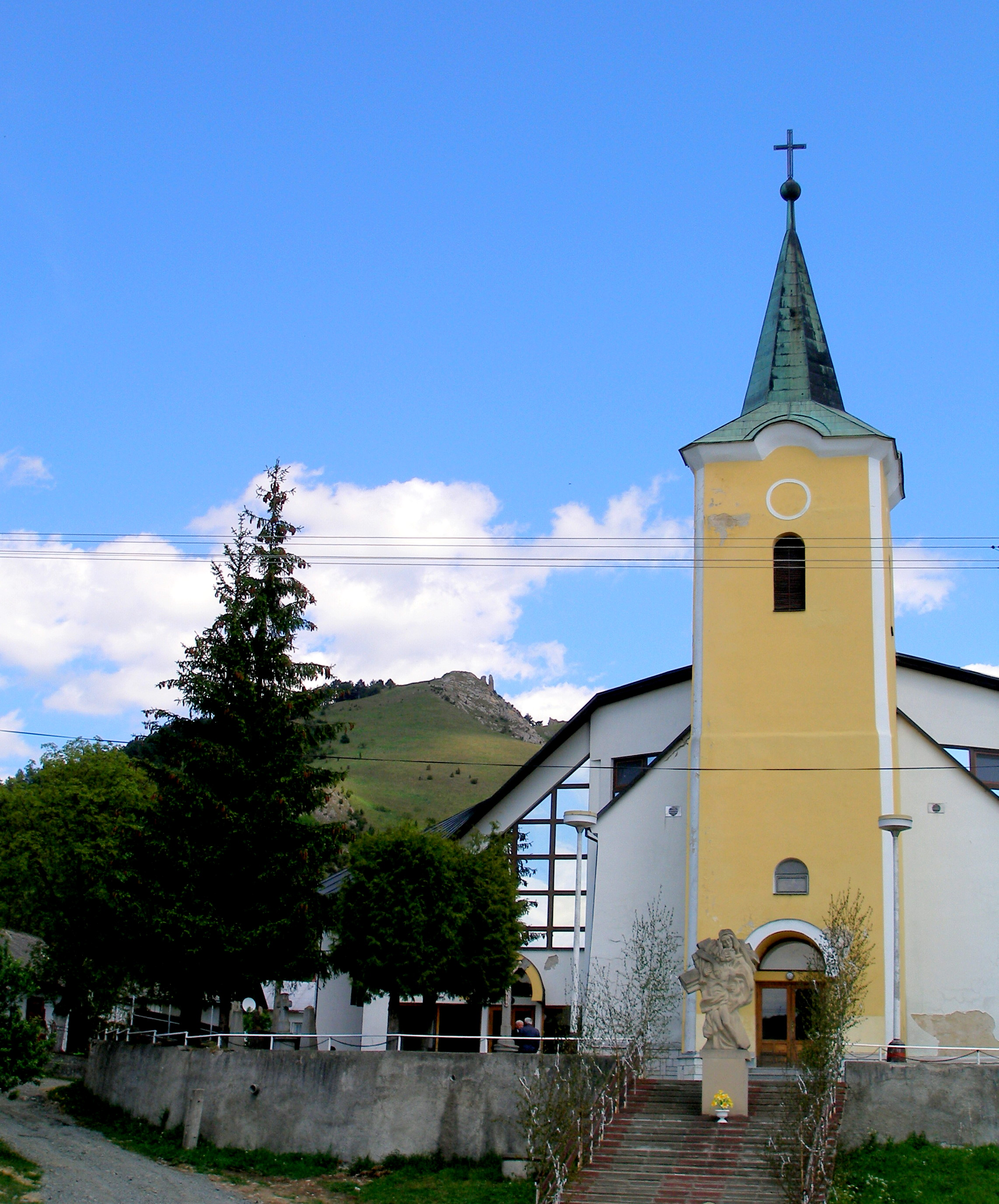 Obec Kamenica okres Sabinov.